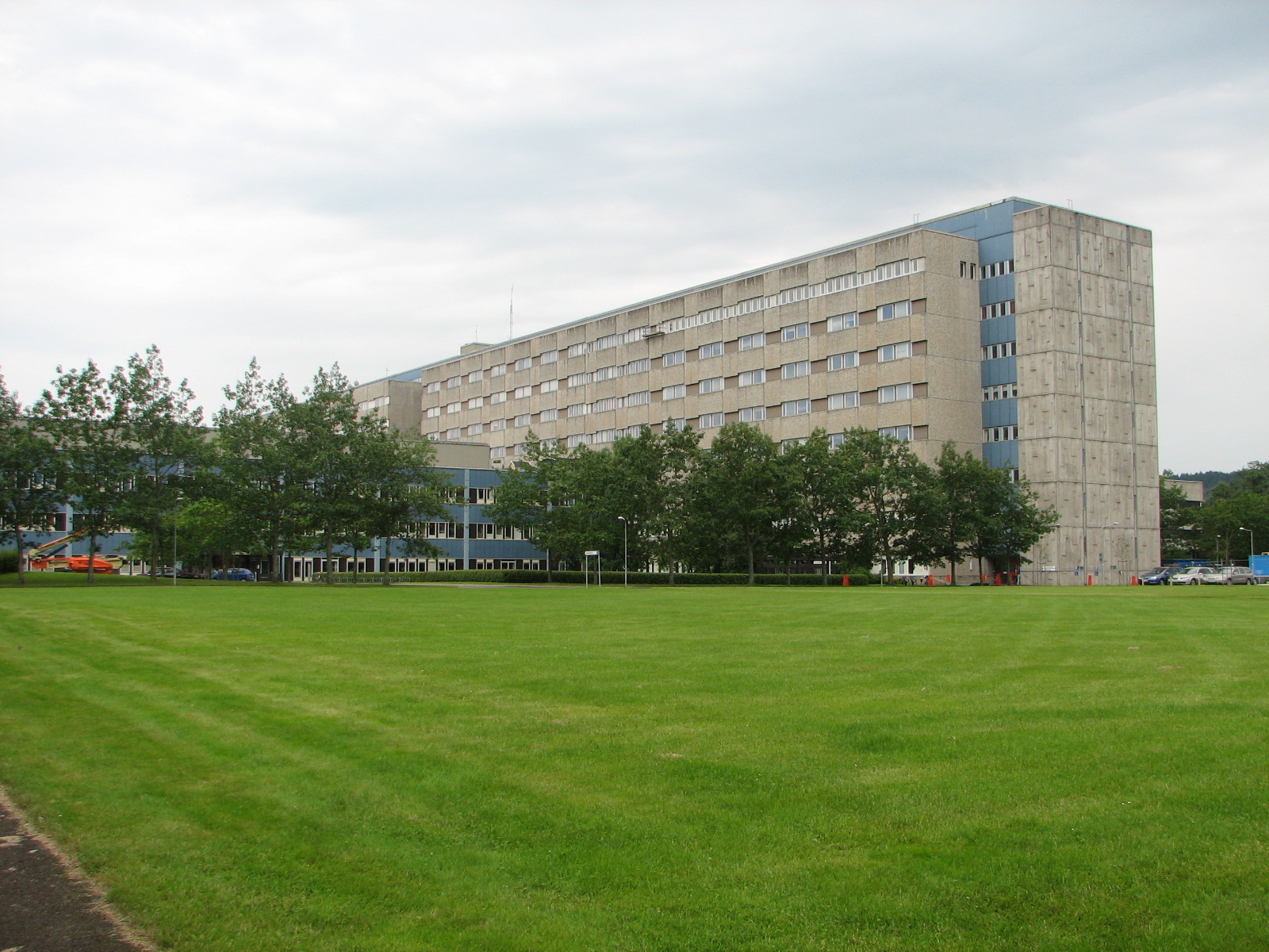 Kärnsjukhuset i Skövde (KSS) sett från norr